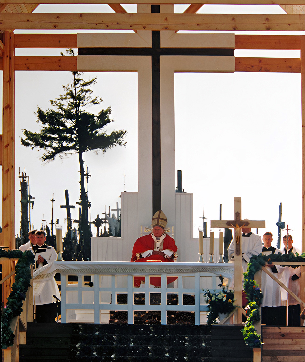 Johannes Paulus II håller den historiska mässan vid Korskullen 7 sep 1993..